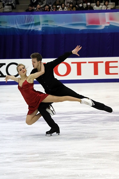 Виктория Синицина и Никита Кацалапов на этапе Гран-при NHK Trophy 2016